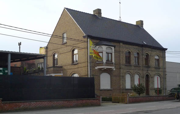 Elverdingestraat_004